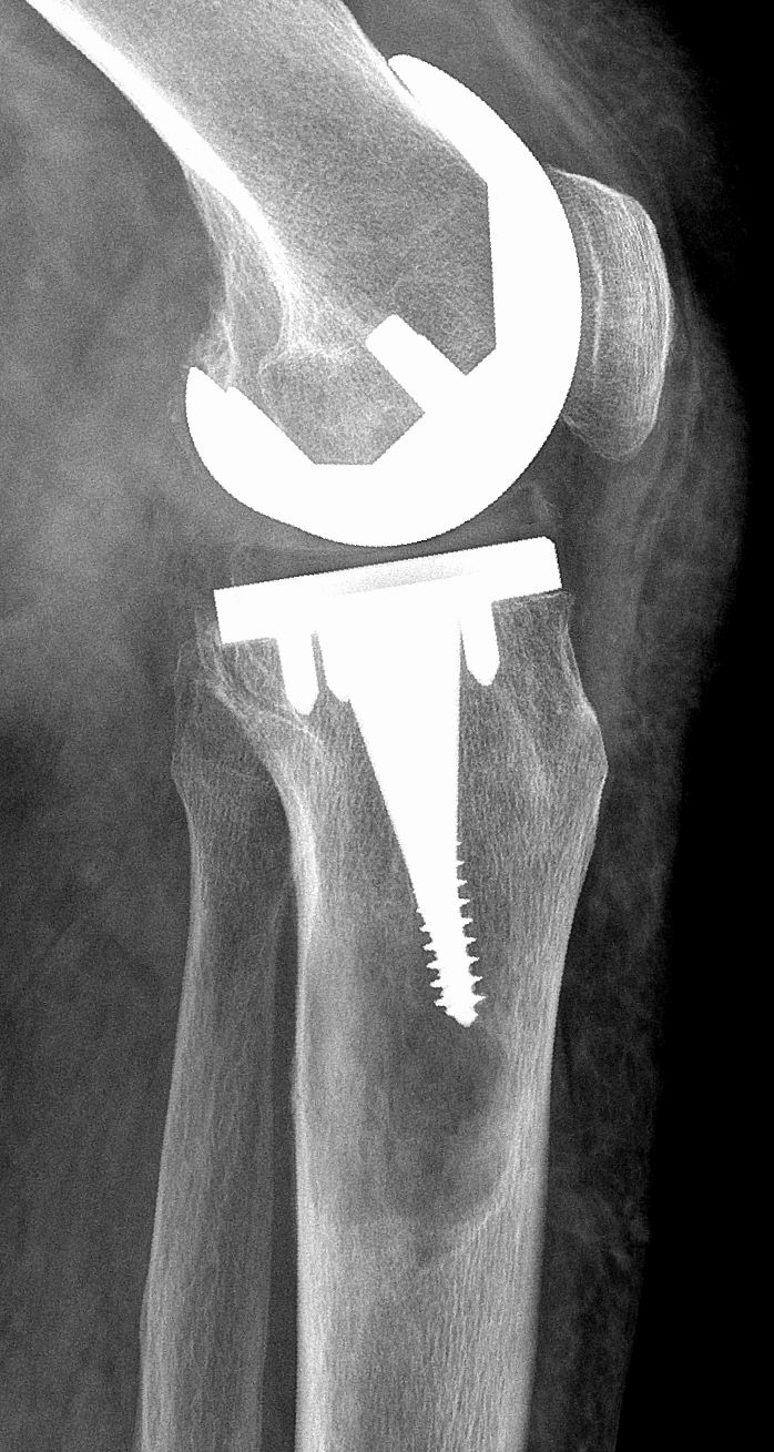 Fremdkörpergranulom in der Tibia um die Spitze einer Knieprothese. Man erkennt gut die zystoide Lysezone.